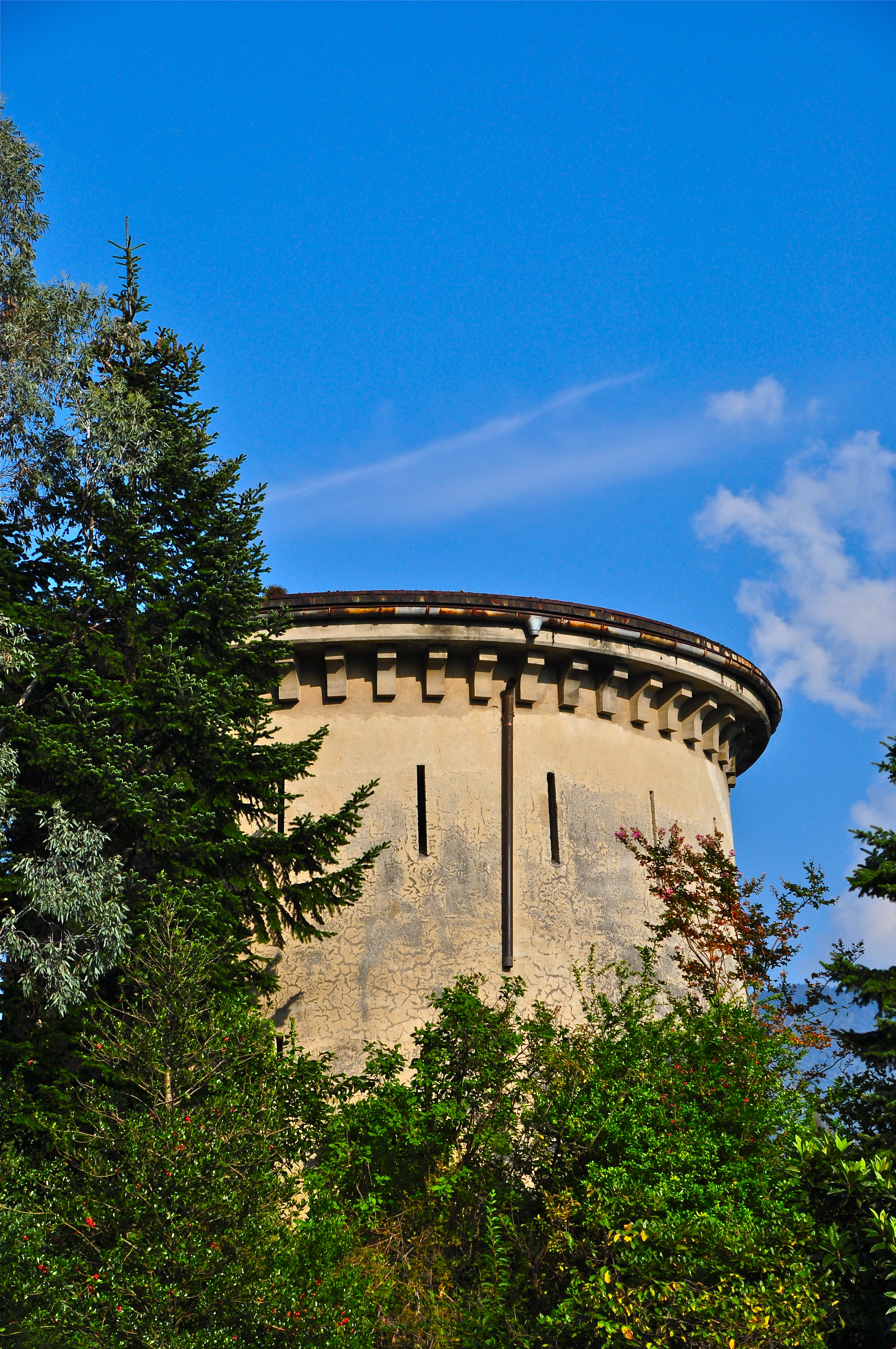 Torre